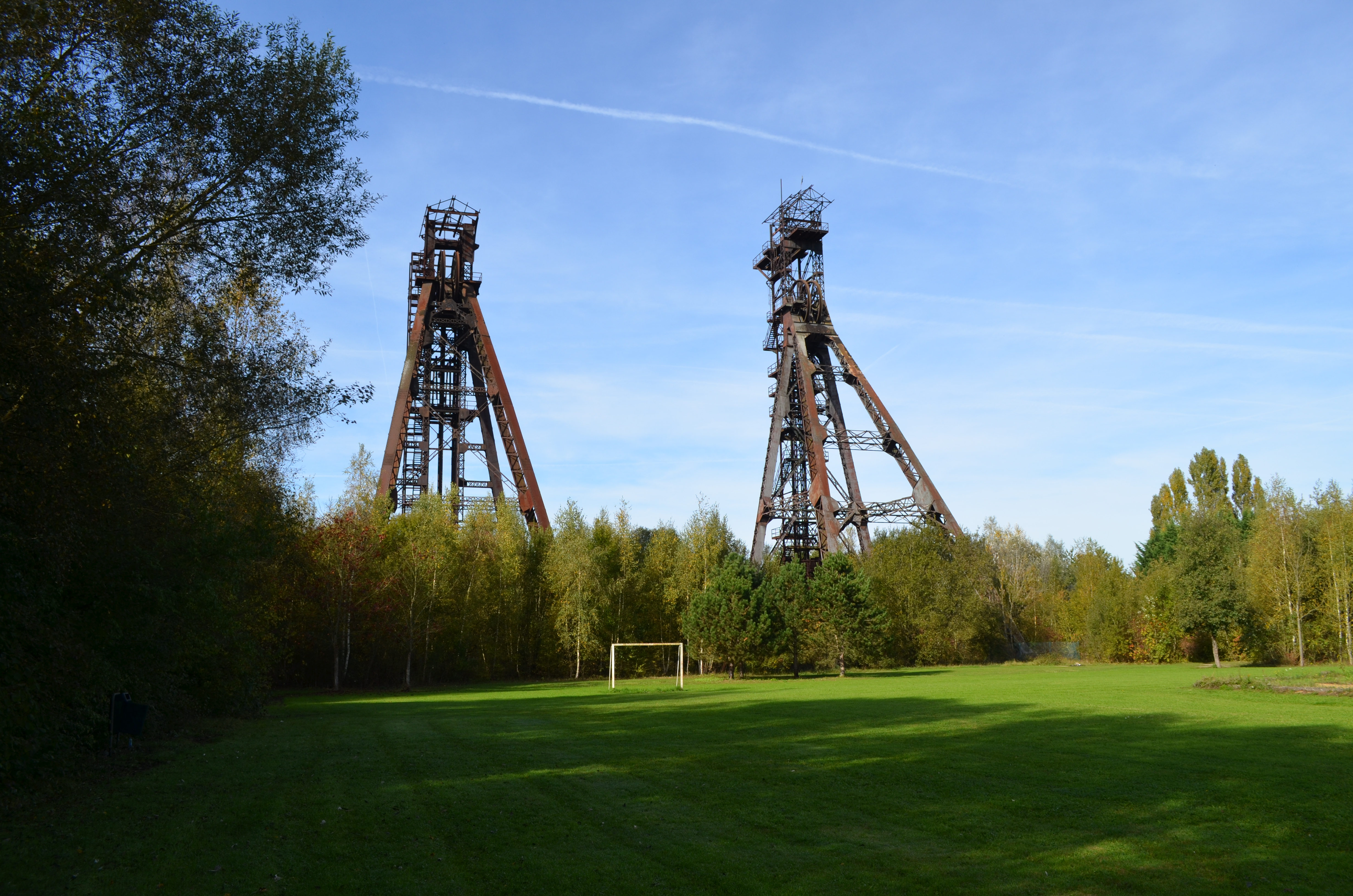 Couillet (Charleroi-Belgique) - Chevalements du puits du Pêchon.